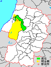 Map of Higashitagawa District, Yamagata, Japan